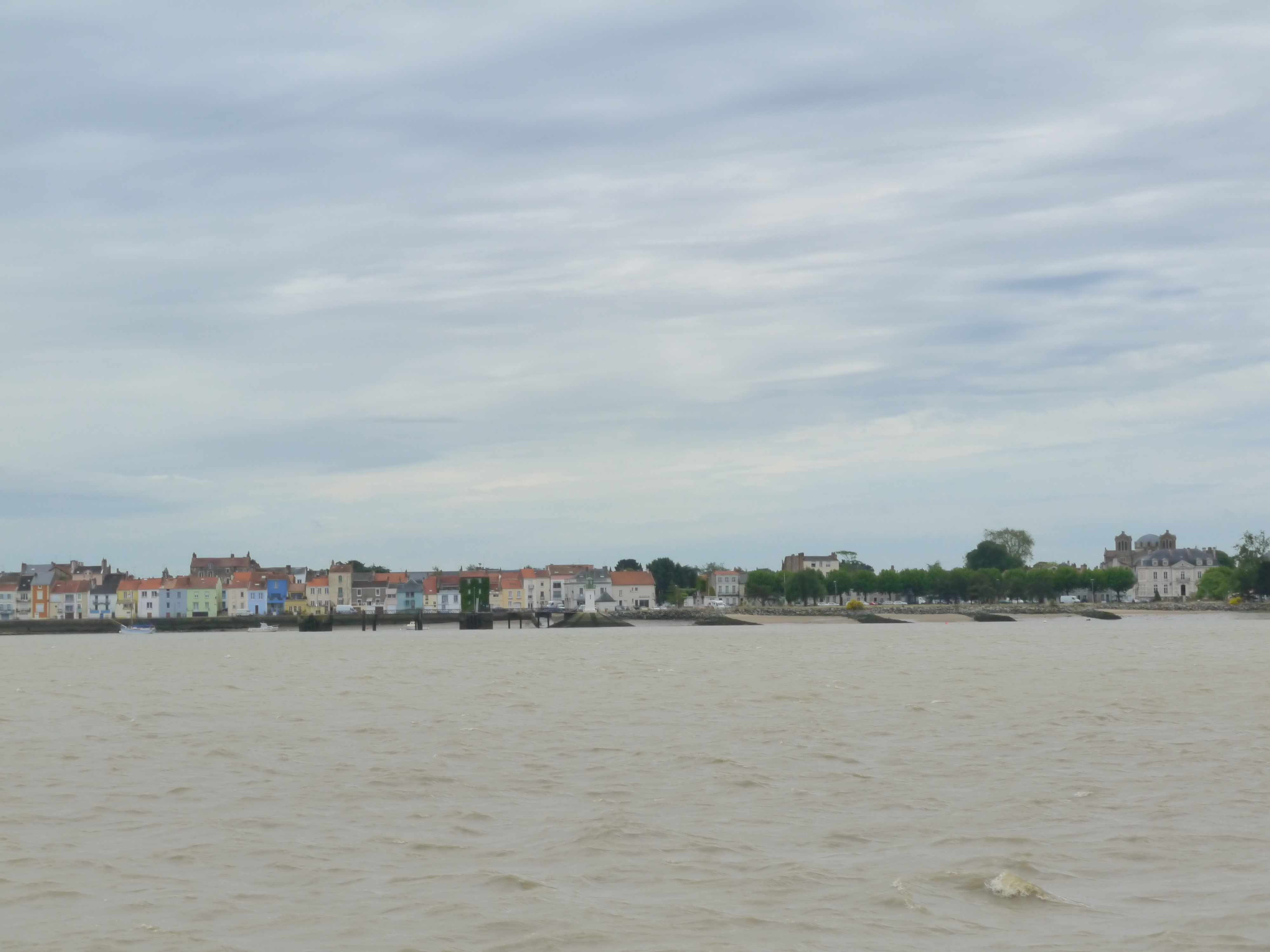 Vue des quais de Paimboeuf depuis la Loire